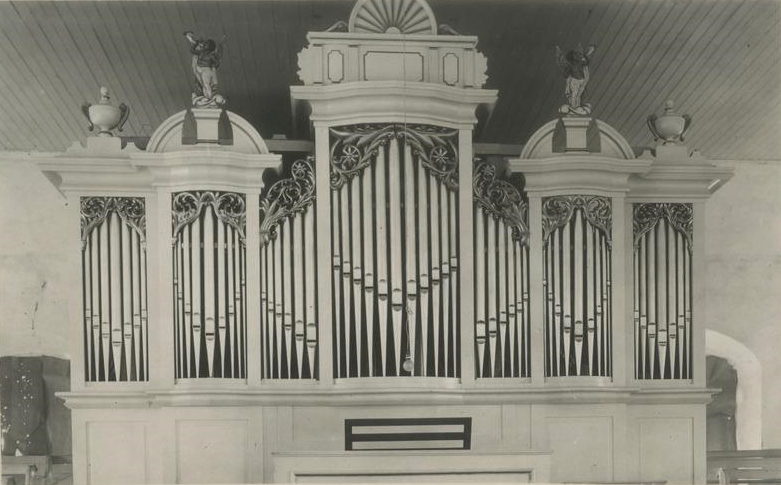 Орган церкви святой Марии в Рыуге, Эстония. Строители - братья Крийс (Kriis). Фото сентября 1933 года.